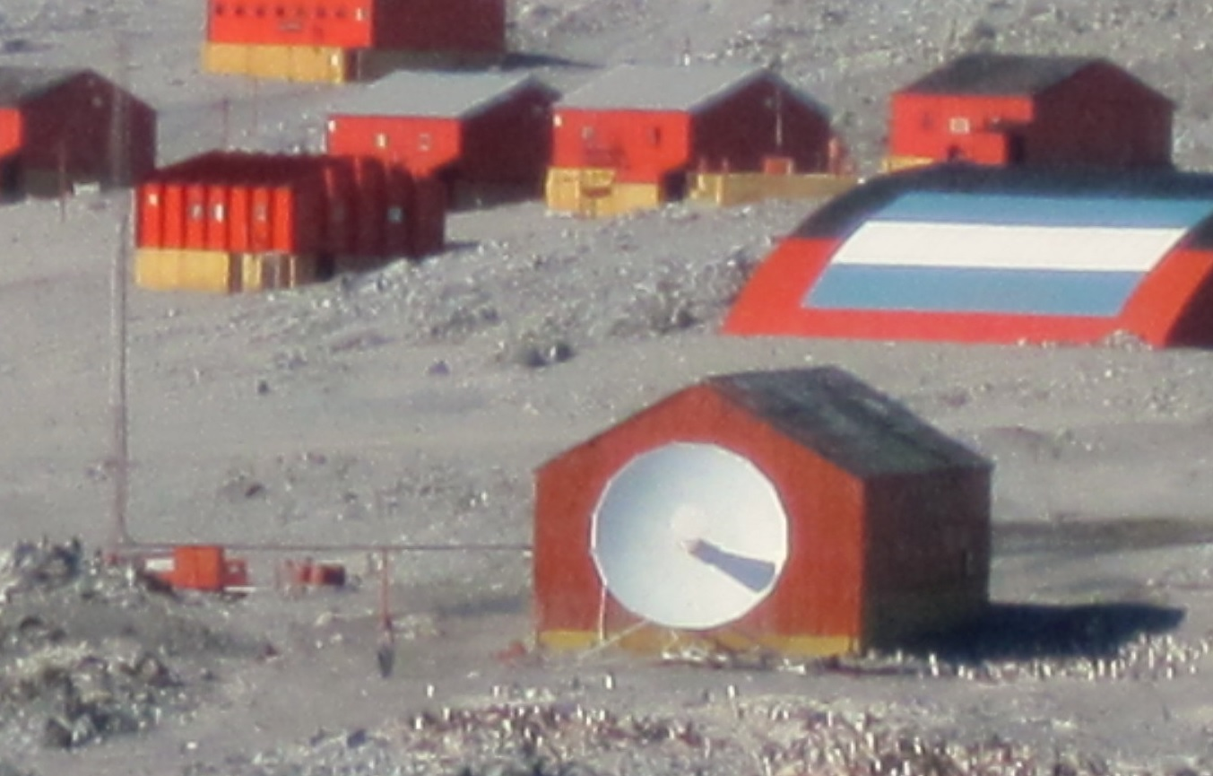 Instalaciones de LRA36 Radio Nacional Arcángel San Gabriel, una de las radios más australes del mundo desde la Base Esperanza, Antártida Argentina